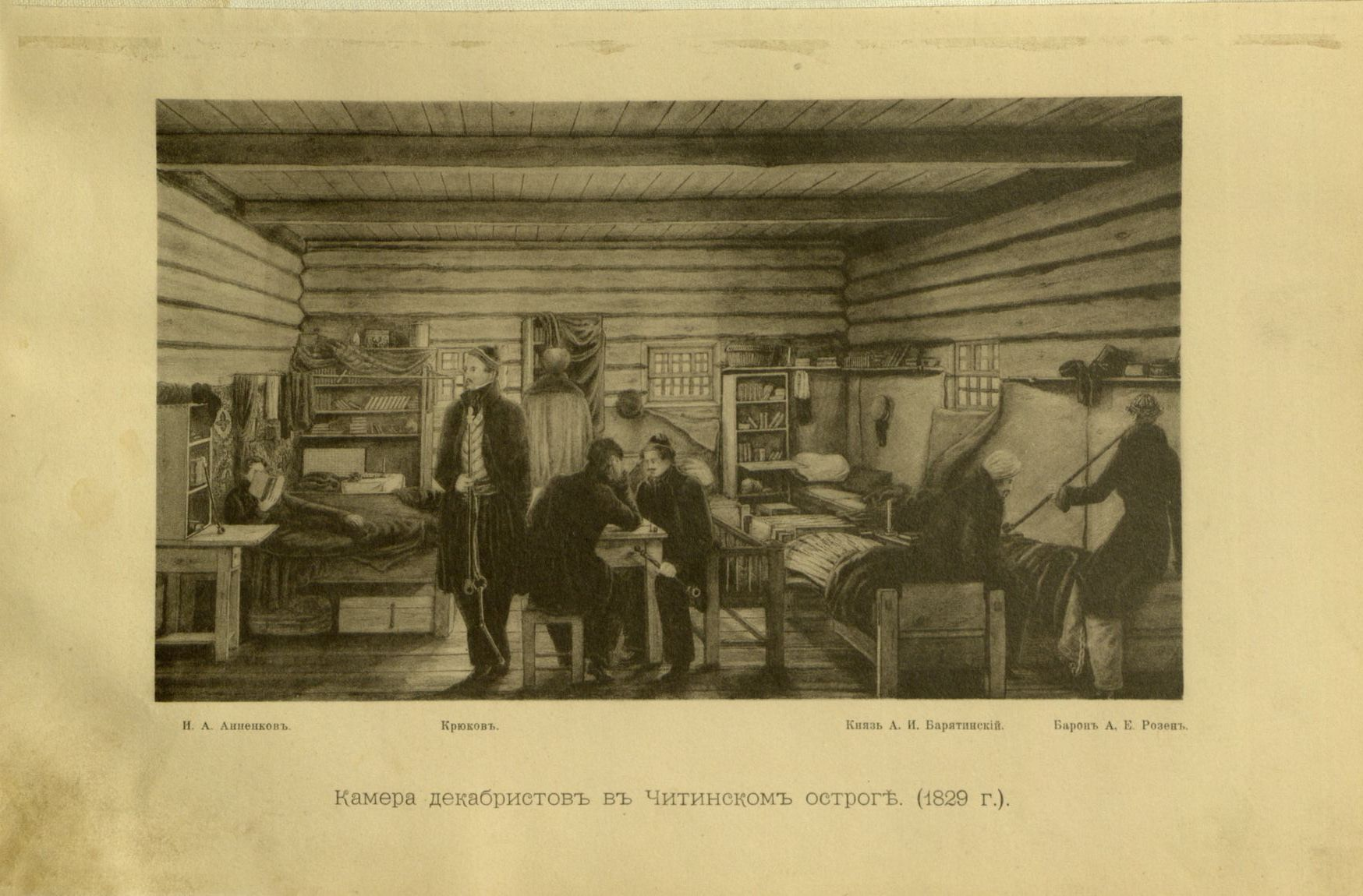 Головачев, П. М. Декабристы : 86 портретов, вид Петровского завода и 2 бытовых рисунка того времени. - М., [1906]